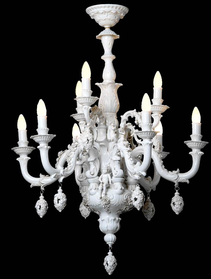 rivisitazione lampadario salottino di porcellana